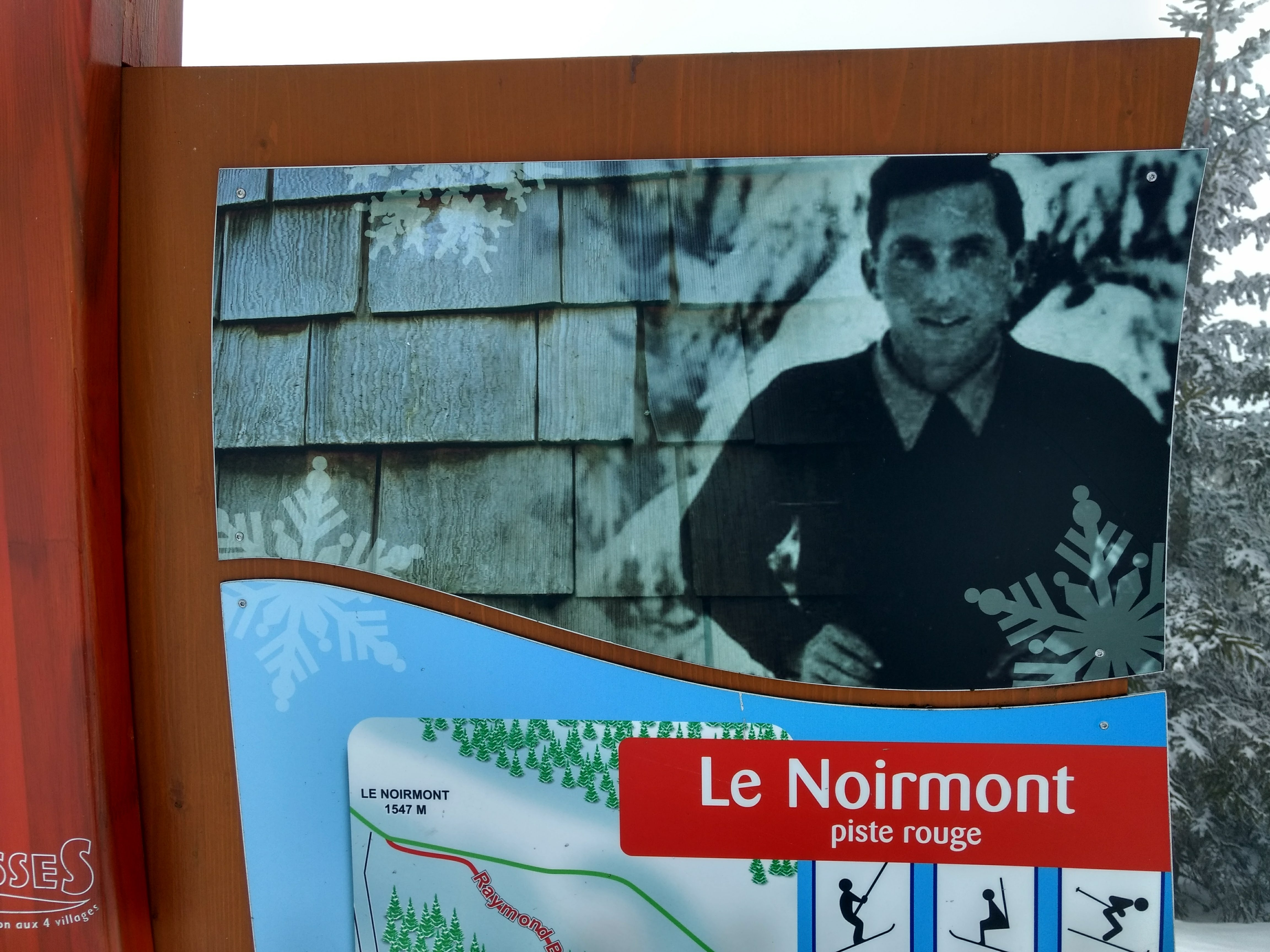 Portrait Raymond Berthet